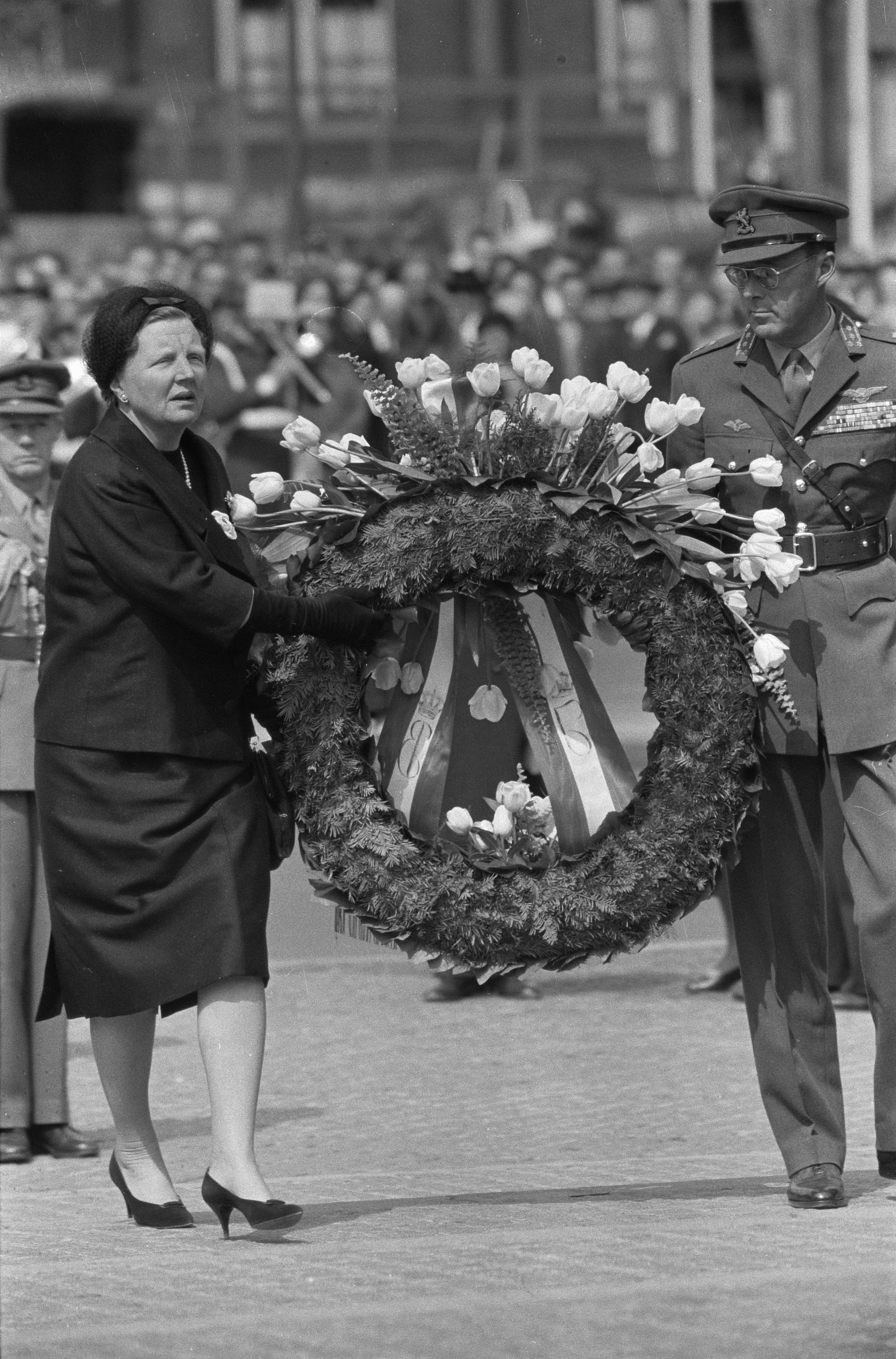 Collectie / Archief : Fotocollectie Anefo Reportage / Serie : [ onbekend ] Beschrijving : Kranslegging door het koninklijk paar bij het Nationaal Monument op de Dam Datum : 4 mei 1960 Locatie : Amsterdam, Noord-Holland Trefwoorden : dodenherdenkingen, koninginnen, kransleggingen, prinsen Persoonsnaam : Bernhard (prins Nederland), Juliana (koningin Nederland) Instellingsnaam : Nationaal Monument Fotograaf : Pot, Harry / Anefo, [onbekend] Auteursrechthebbende : Nationaal Archief Materiaalsoort : Negatief (zwart/wit) Nummer archiefinventaris : bekijk toegang 2.24.01.05 Bestanddeelnummer : 911-2142